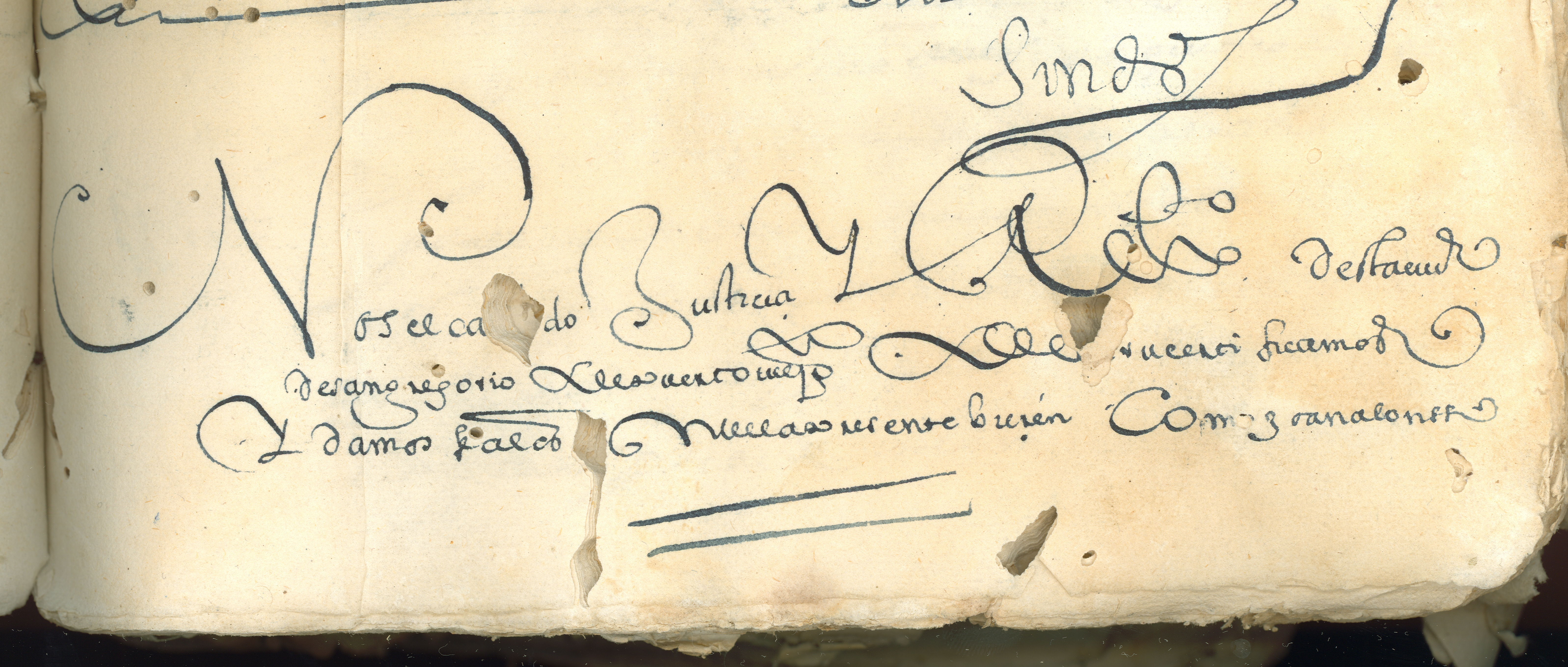 « Nos el Cavildo, Justicia y Regimiento de esta Ciudad de San Gregorio de Puerto Viejo del Pirú, certificamos y damos a los que la presente bieren como (Yo) Joan Alonsso/ Moreira de quien ba firmado el poder de este Alcalde Ordinario en esta dicha Ciudad y su Provincia […] » Diapositiva de Consulta hallada en los Fondos Documentales del Archivo Histórico del Guayas (AHG); Guayaquil, Ecuador.Consultado y compartido por el usuario J. Javier García A.